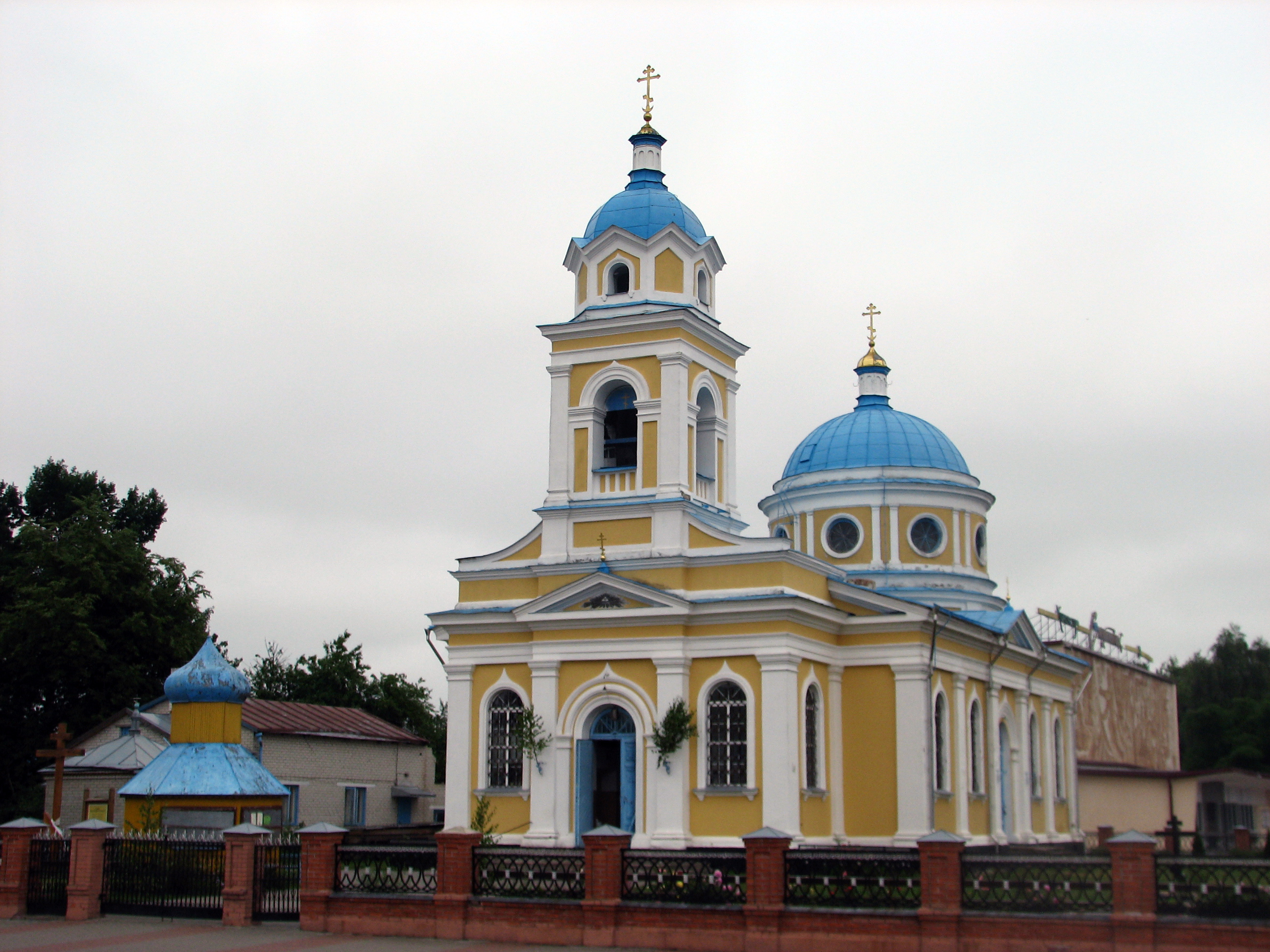 Беларуская (тарашкевіца): Сабор Аляксандра Неўскага (Пружаны)